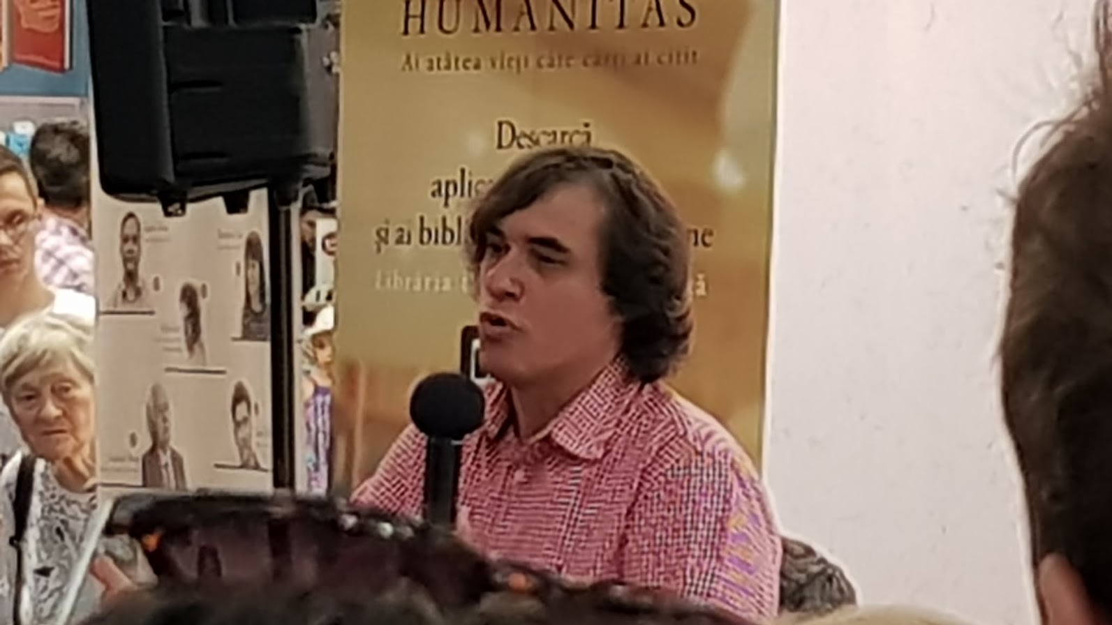 Mircea Cărtărescu la lansarea volumului "Un om care scrie. Jurnal 2011-2017". Bookfest București 2018, Romexpo.